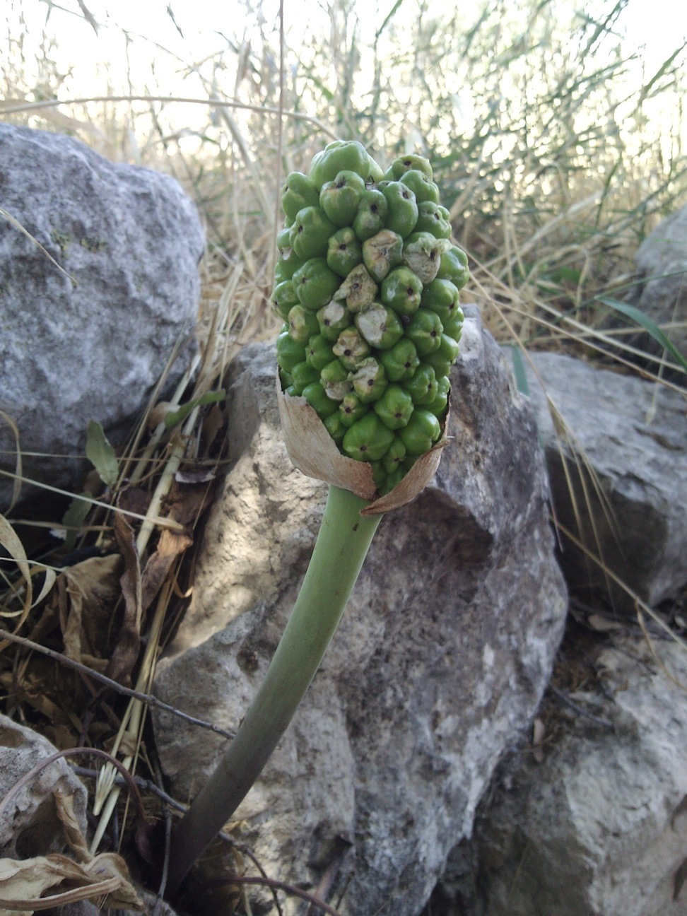 לוף ארצישראלי